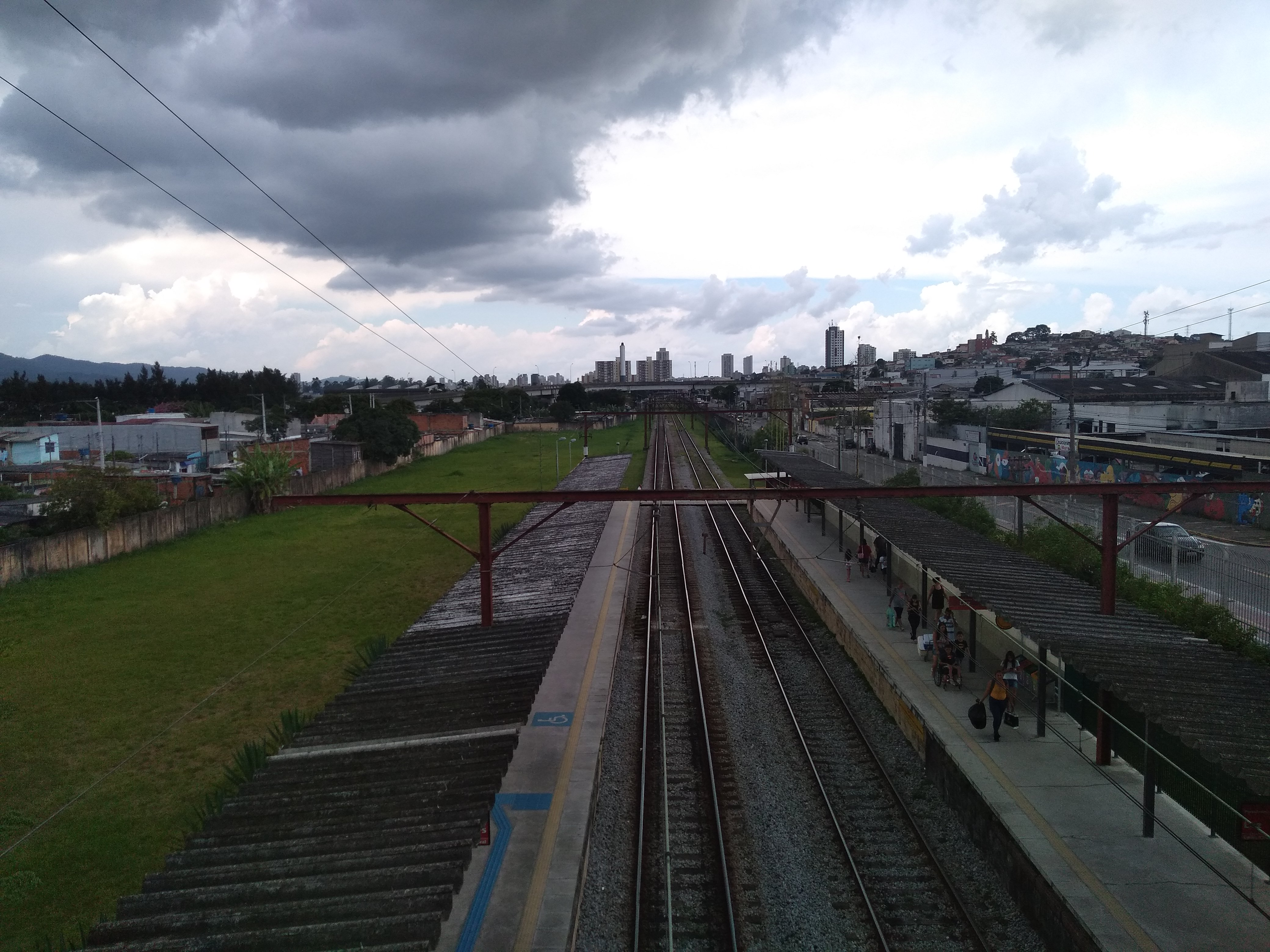 plataformas da estação Braz Cubas, Linha 11 Coral da CPTM, Mogi das Cruzes/SP, Brasil • olhando ao Leste